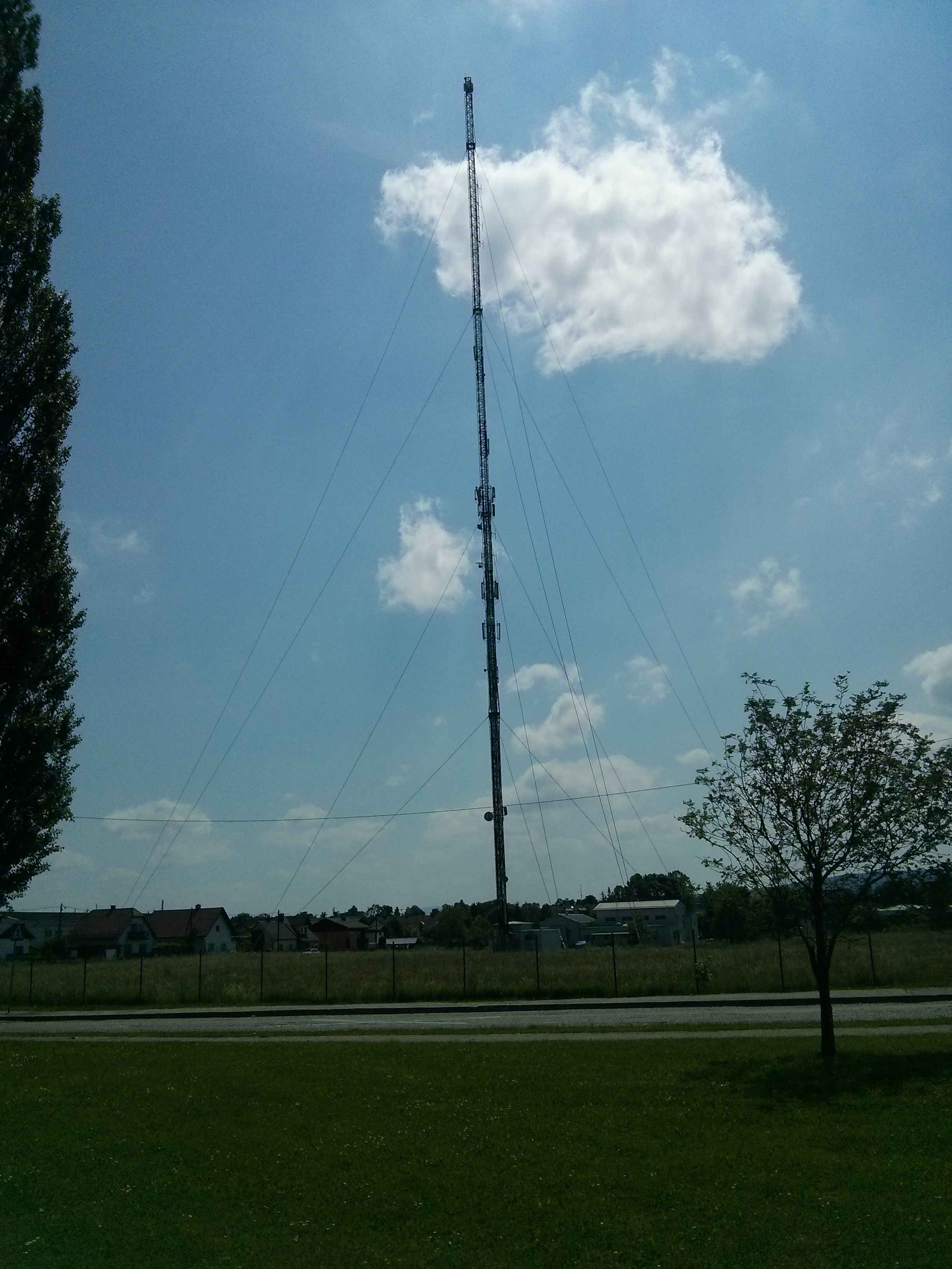 Telekomunikacijski objekt Maribor-Tezno.